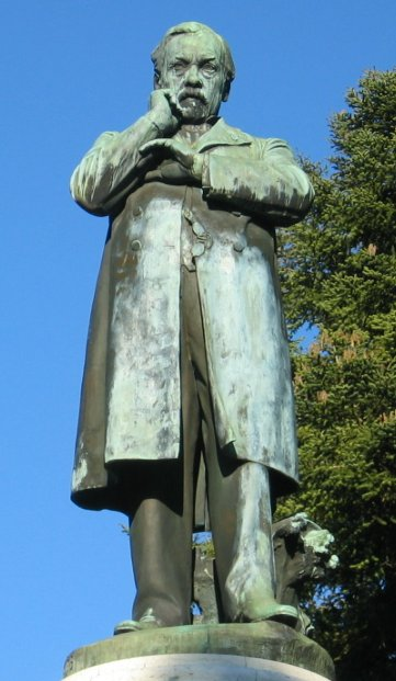 Statue de Louis Pasteur à Dole dans le Jura (ville de sa naissance).